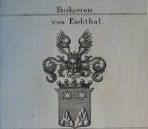 Wappen der Freiherrlichen Familie von Eichthal